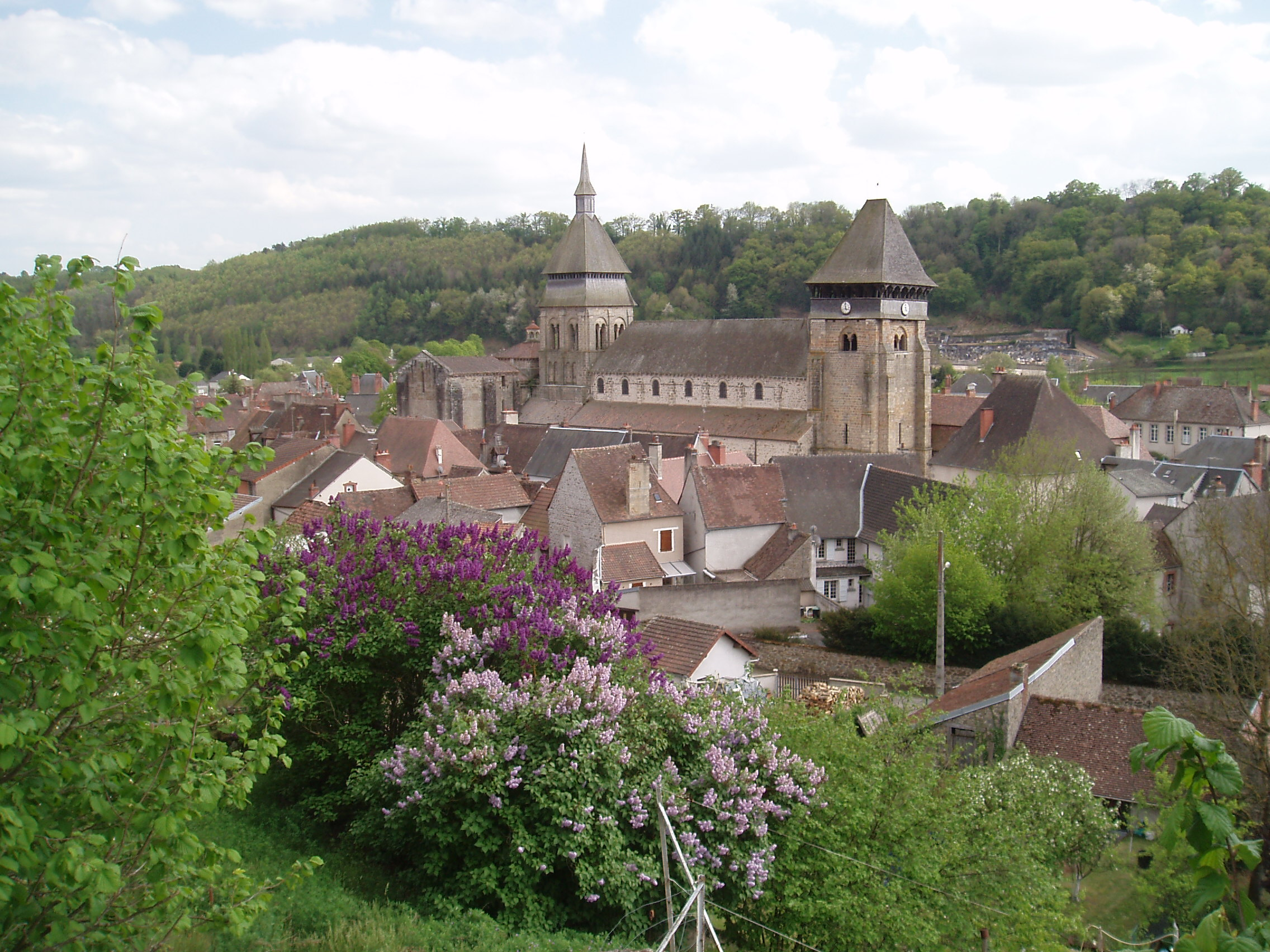 village de Chambon